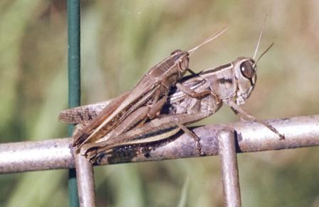 Palermo, Sicily